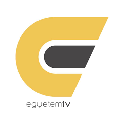 Az Egyetem TV logója